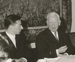 Dr. Dietrich Leßmann (JC! Masovia) als Sprecher des CDK im Gespräch mit Bundespräsident Walter Lübcke in der Villa Hammerschmidt. 02.05.1964